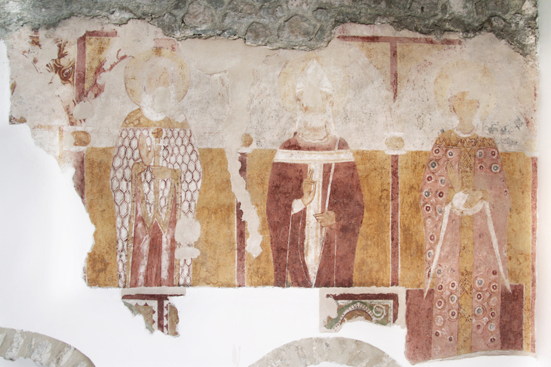 Affresco bizantino sulla parete destra con figure di Santi ed un Vescovo